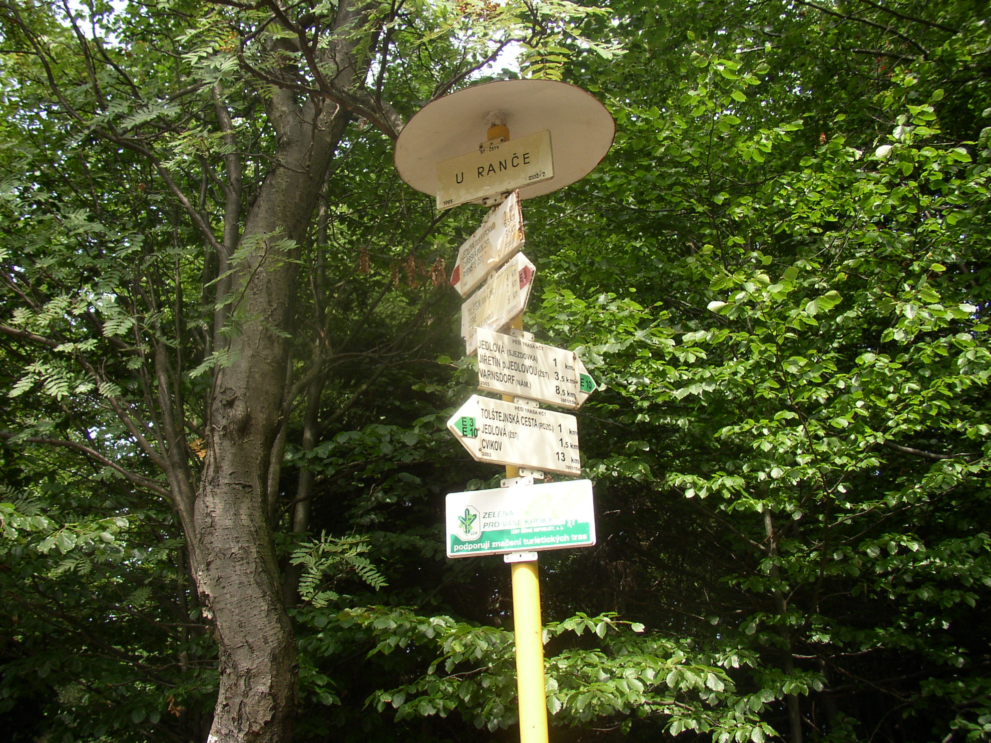 Česky: Turistický ukazatel na křižovatce evropských dálkových tras E3 a E10 poblíž Ranče 7D, osada Jedlová, Jiřetín pod Jedlovou, okres Děčín, Česká republika.